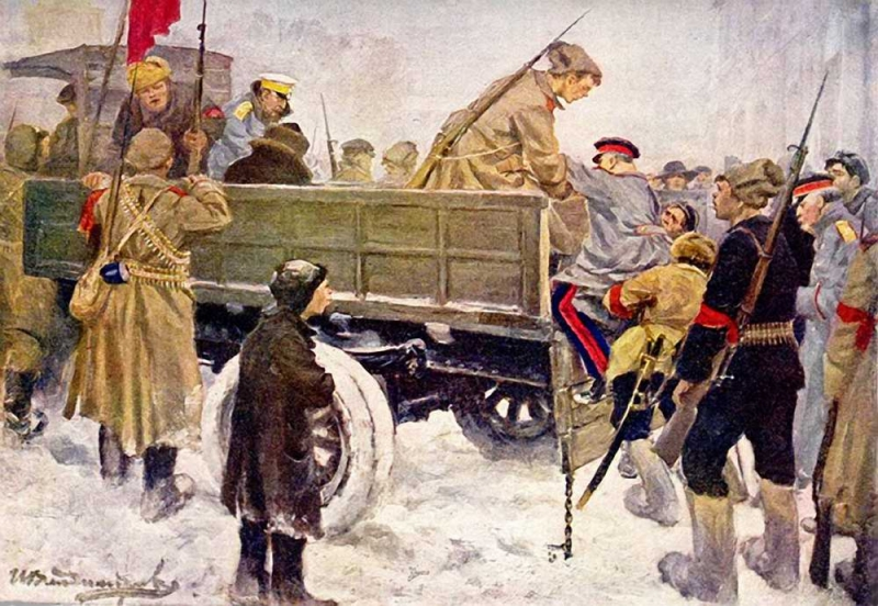 Арест генералов